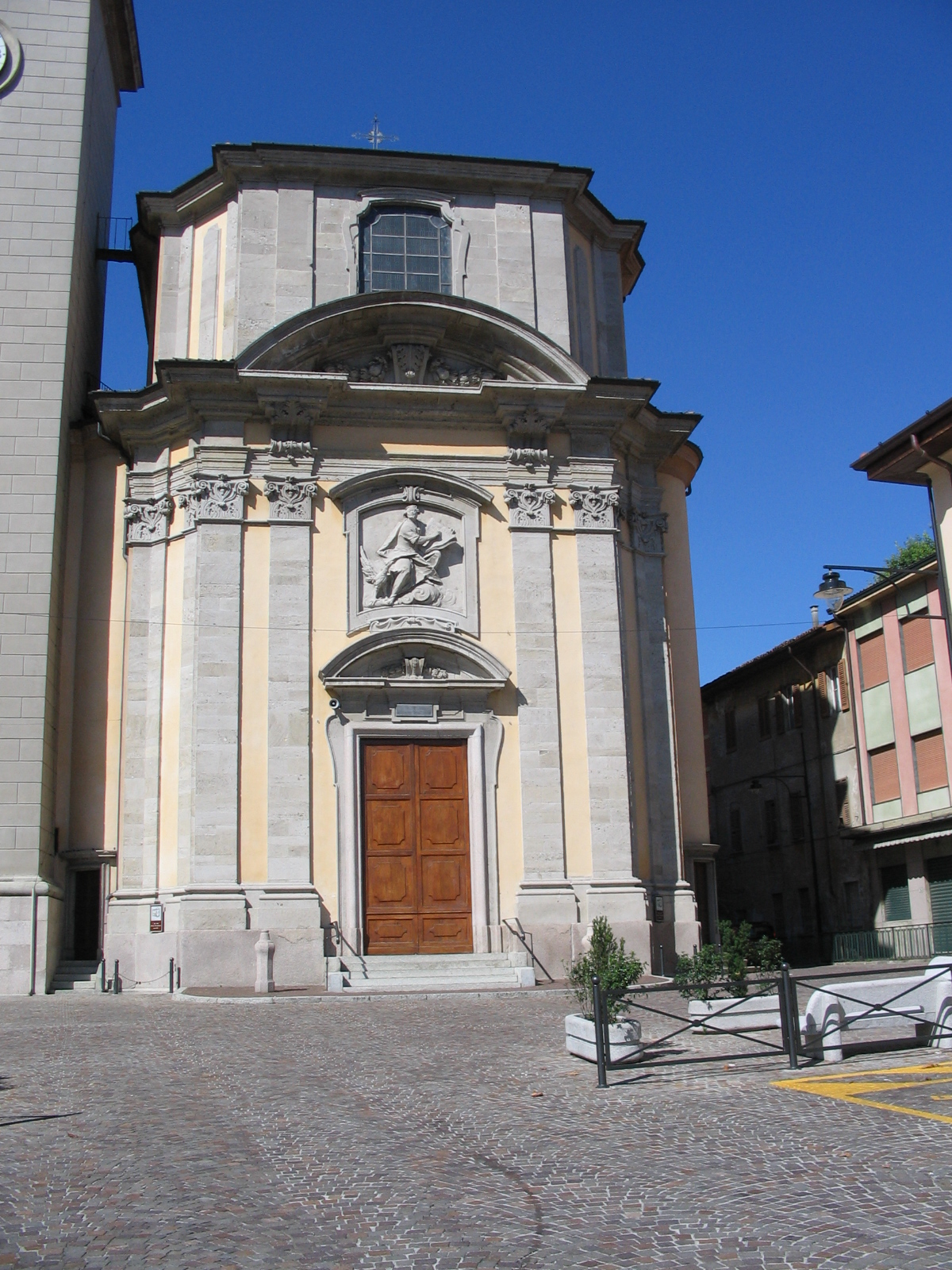 Autore Giorces. Canonica d'Adda, la Parrocchiale.